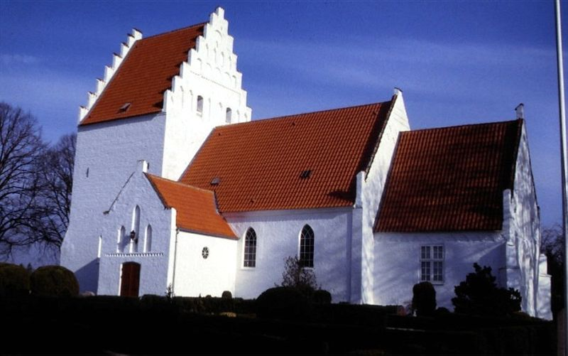 Ønslev Kirke i Danmark. Ønslev kirke